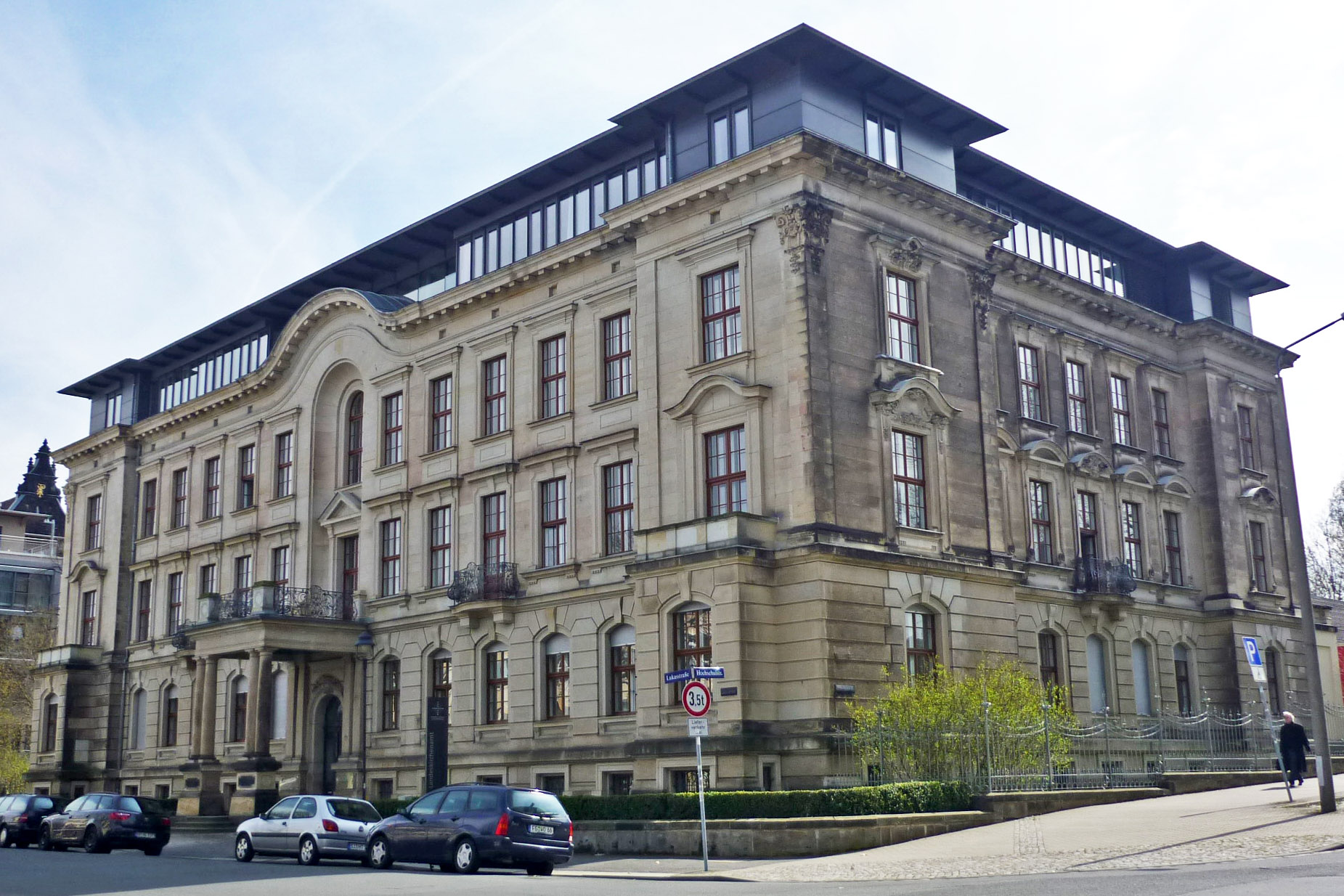 Landeskirchenamt der Evangelisch-Lutherische Landeskirche Sachsens. Lukasstraße 6 in Dresden-Südvorstadt